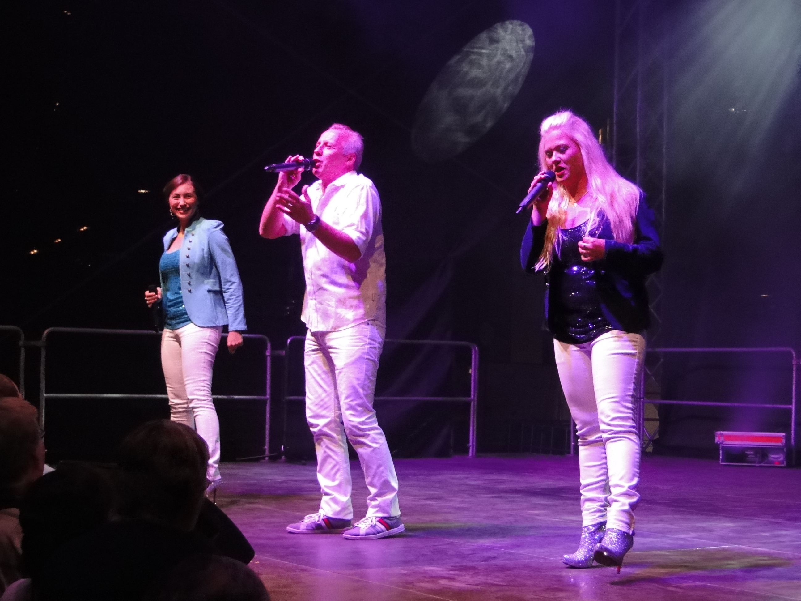 Die deutsche Gruppe "Wind" im Jahr 2013 in Dresden